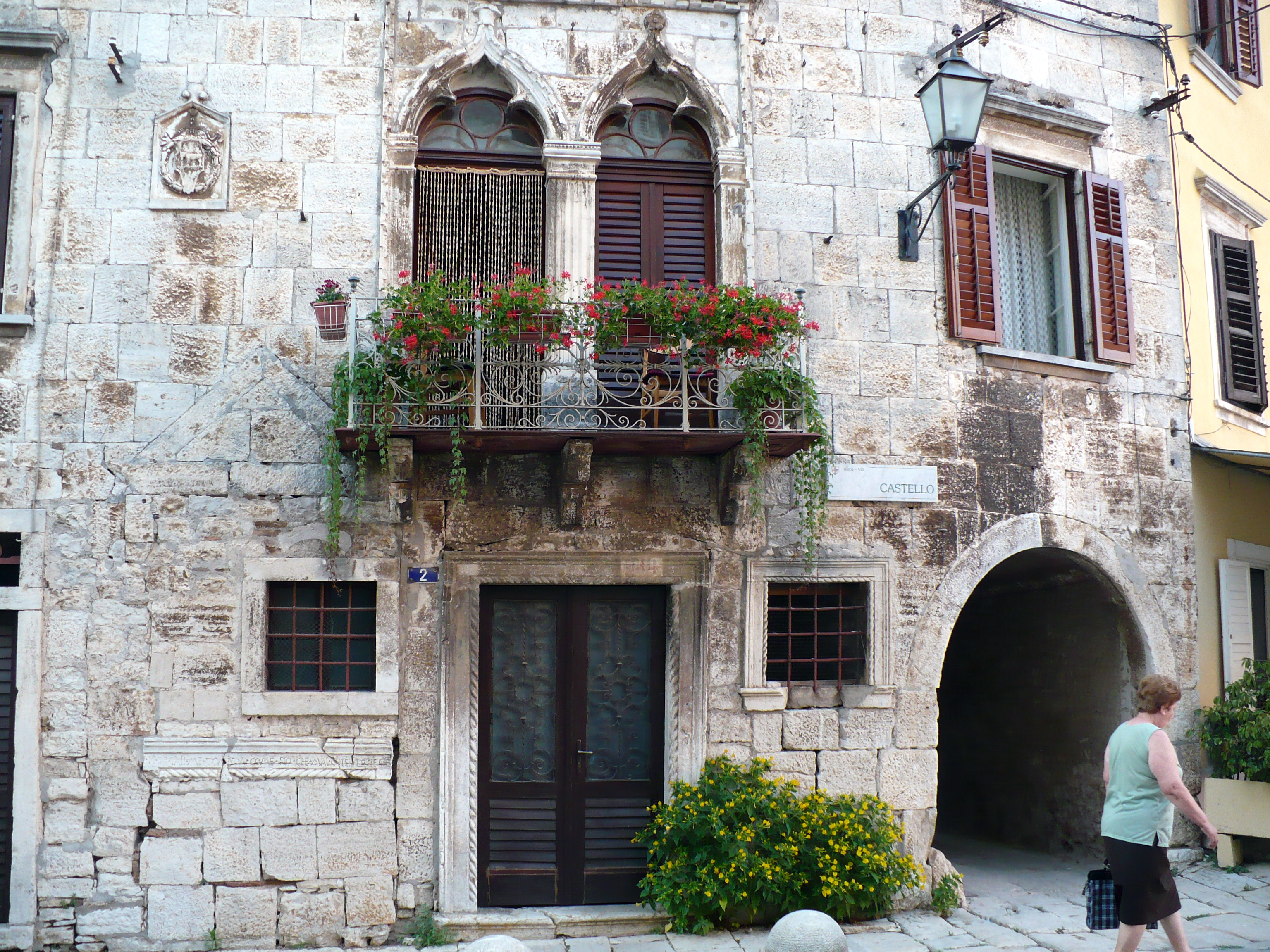 Vodnjan